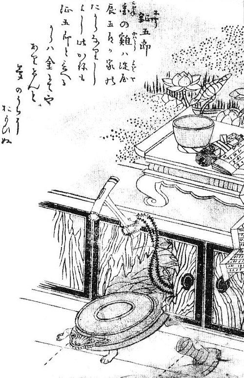 Shōgorō (鉦五郎) from the Gazu Hyakki Tsurezure Bukuro (百器徒然袋)